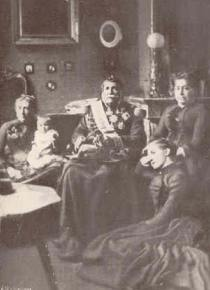 Le lieutenant-général Mathieu Brialmont en 1884, entouré de sa fille, de sa petite-fille, de son arrière-petite-fille et de la fille de celle-ci.